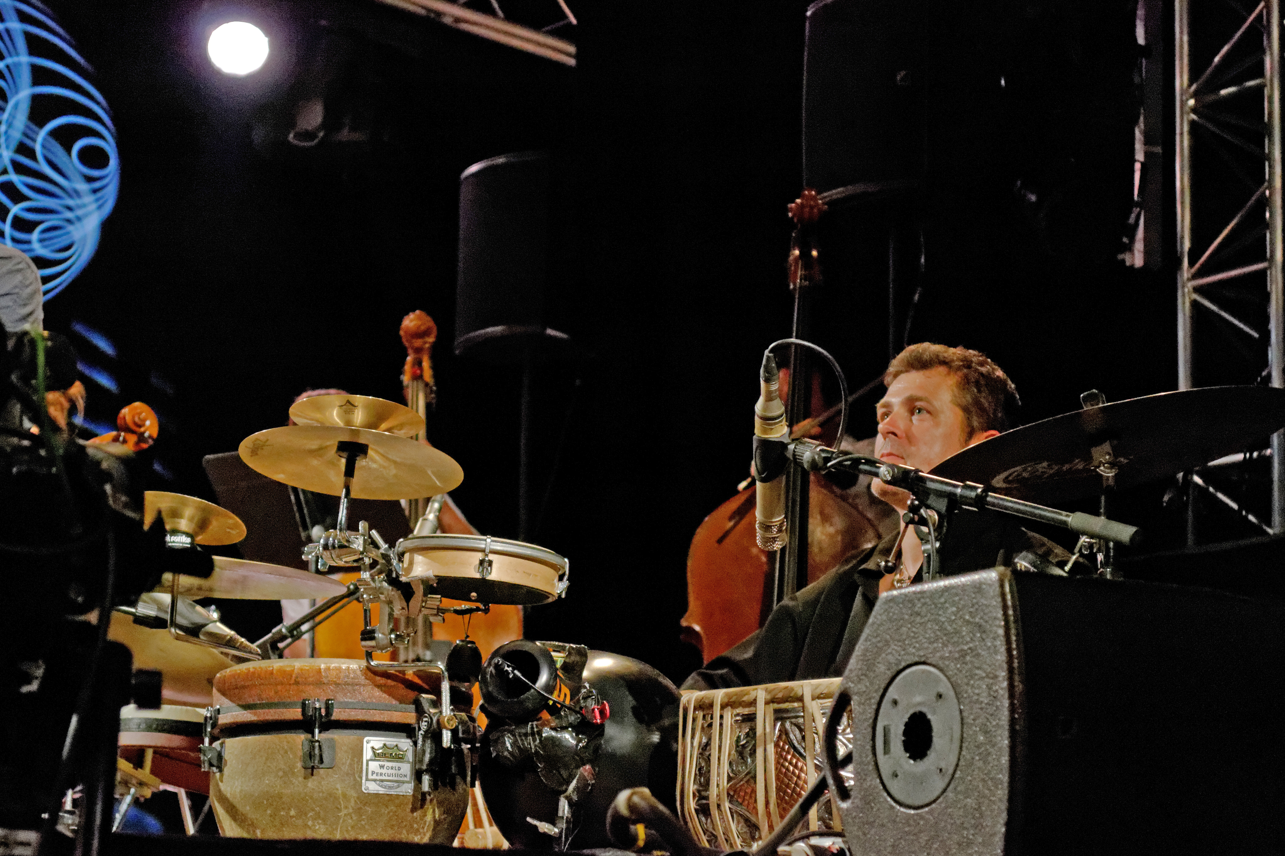 Didier Squiban et l'Orchestre symphonique de Bretagne pour sa Symphonie N°3 "Le Ponant" lors du festival de Cornouaille à l'espace Gradlon le 25 juillet 2014.